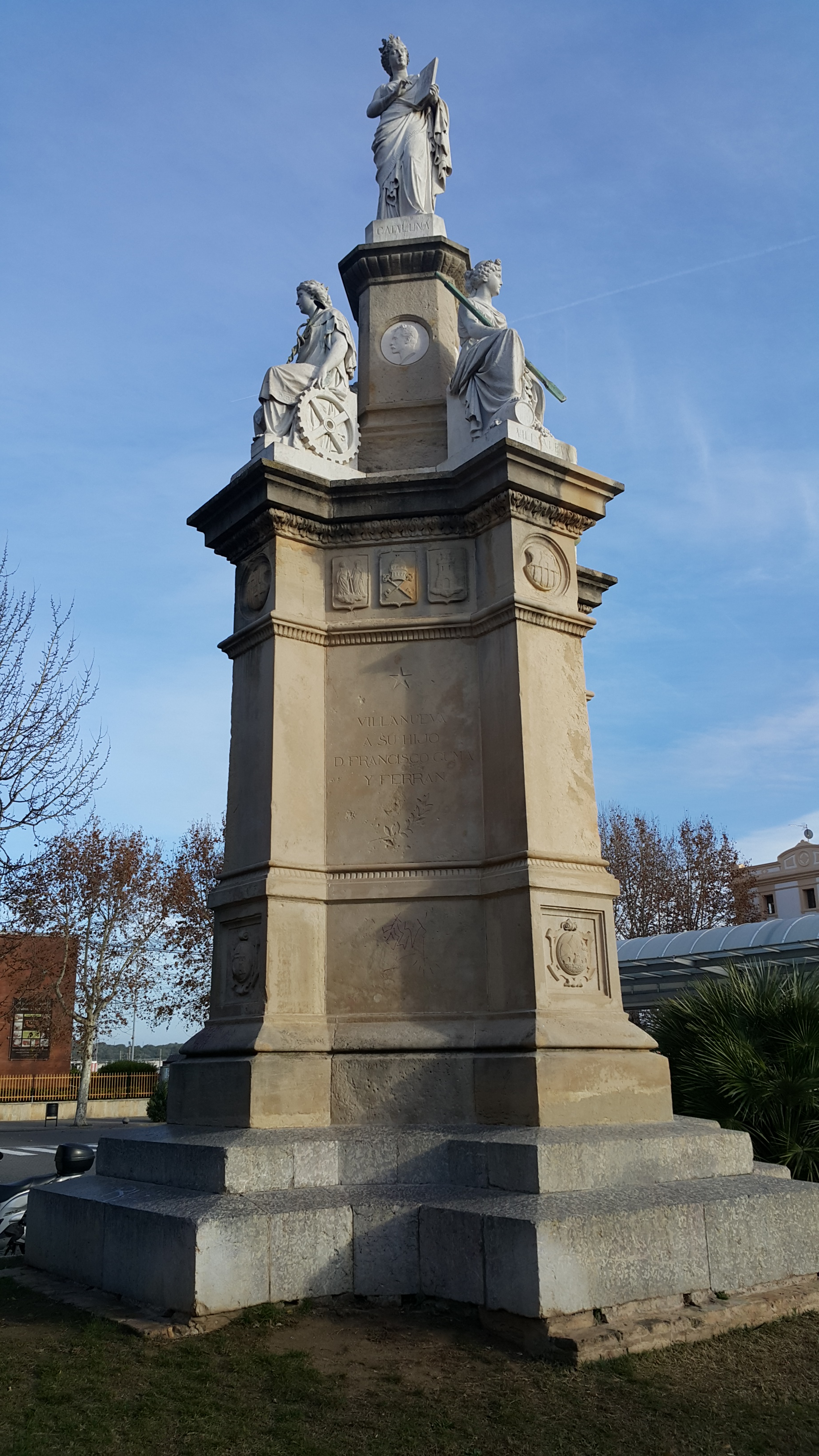 Vilanova i la Geltrú - Monument a Francesc Gumà i Ferran.